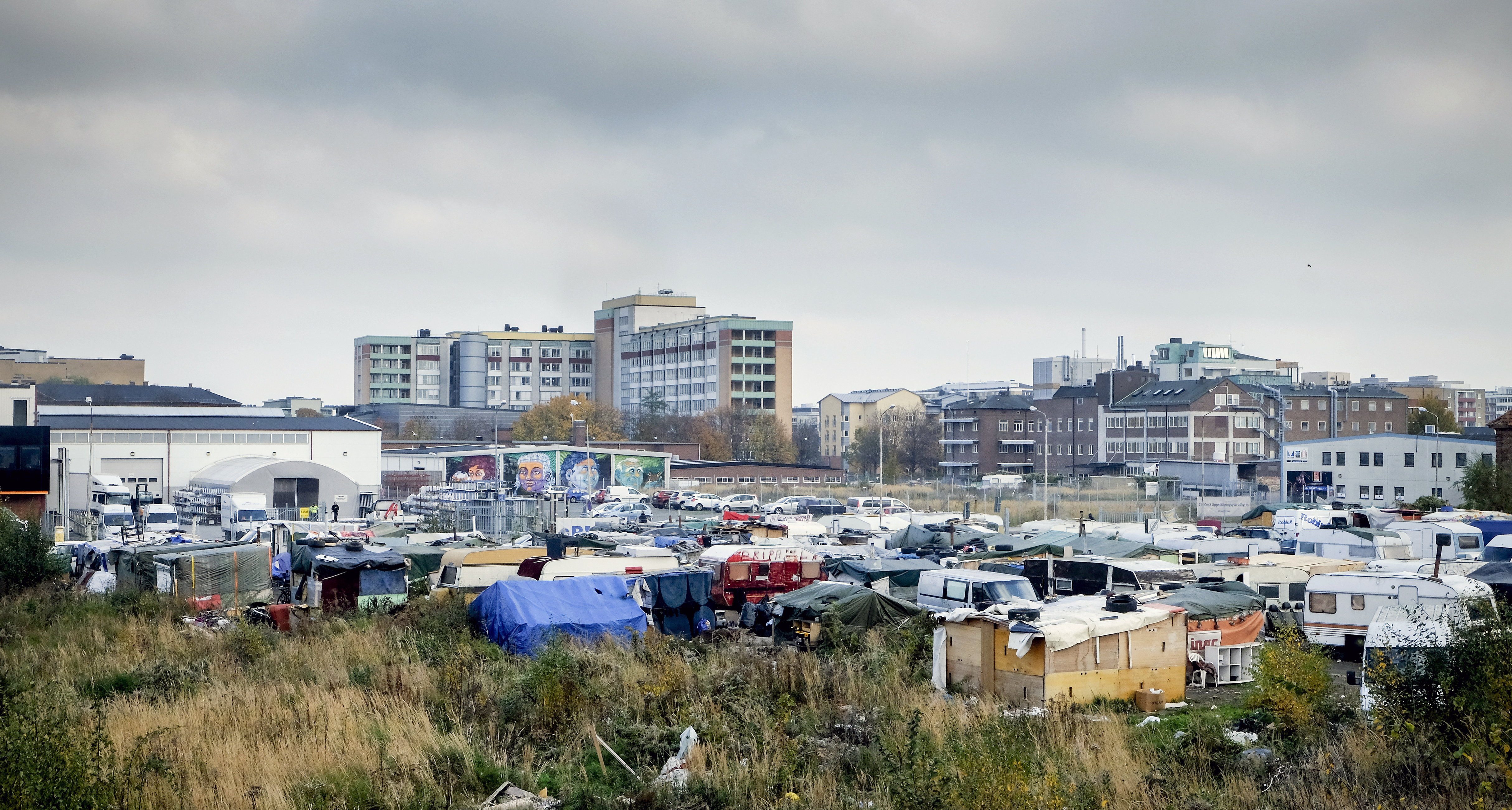 Obebyggd tomt i hörnan Industrigatan och Nobelvägen i Malmö där hundratals EU-migranter bosatt sig utan tillgång till värme, avlopp och rinnande vatten. Efter beslut i Malmö stad måste de lämna området senast kl 16 söndagen den 1 november 2016. Bilden är tagen 20151029 Photo: News Øresund - Johan Wessman © News Øresund(CC BY 3.0) Detta verk av News Øresund är licensierat under en Creative Commons Erkännande 3.0 Unported-licens (CC BY 3.0). Bilden får fritt publiceras under förutsättning att källa anges. The picture can be used freely under the prerequisite that the source is given. News Øresund, Malmö, Sweden. News Øresund är en oberoende regional nyhetsbyrå som är en del av det oberoende dansk-svenska kunskapscentrat Øresundsinstituttet.